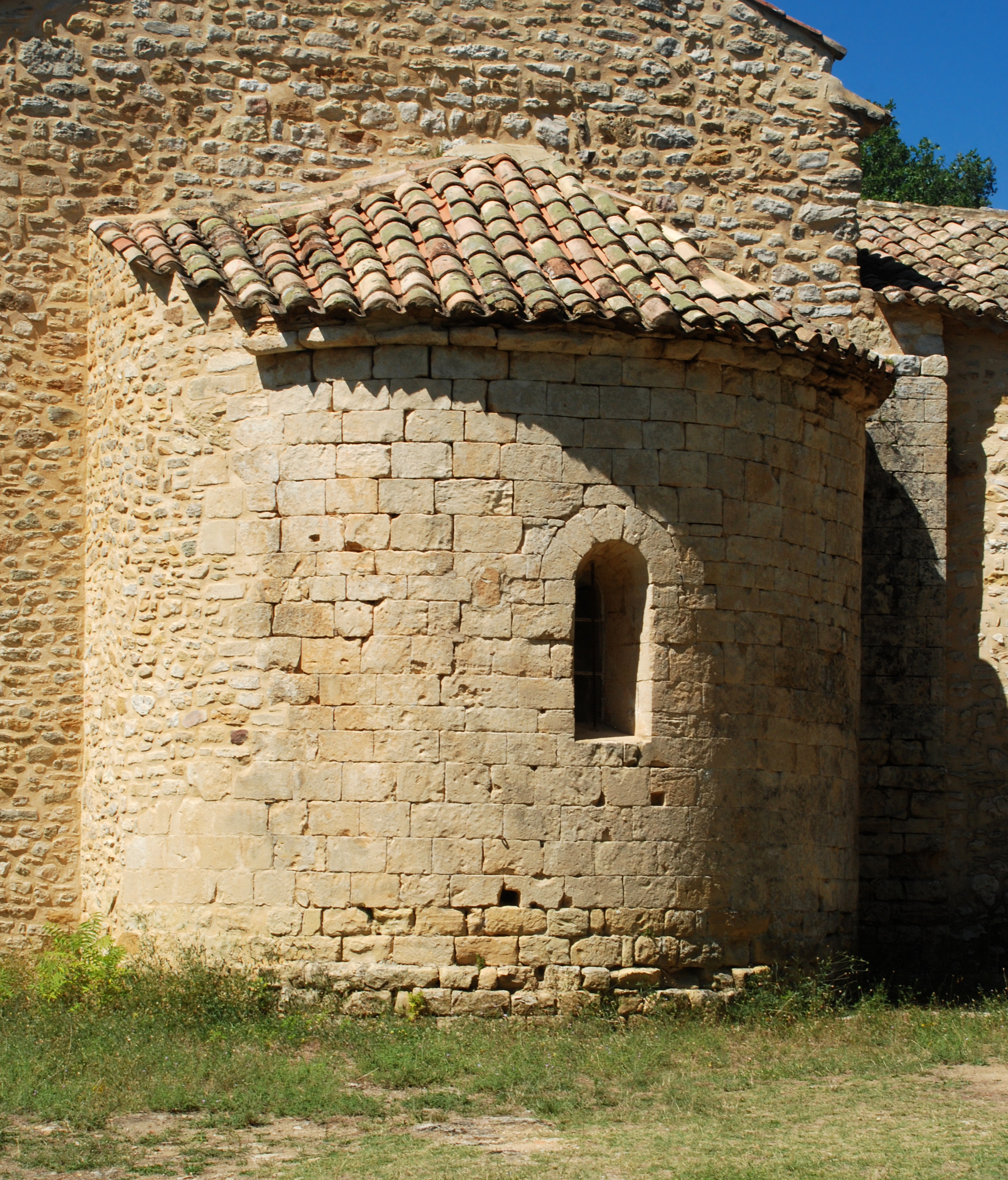 France - Gard - Cavillargues - Ermitage Notre-Dame-du-Saint-Sépulcre .